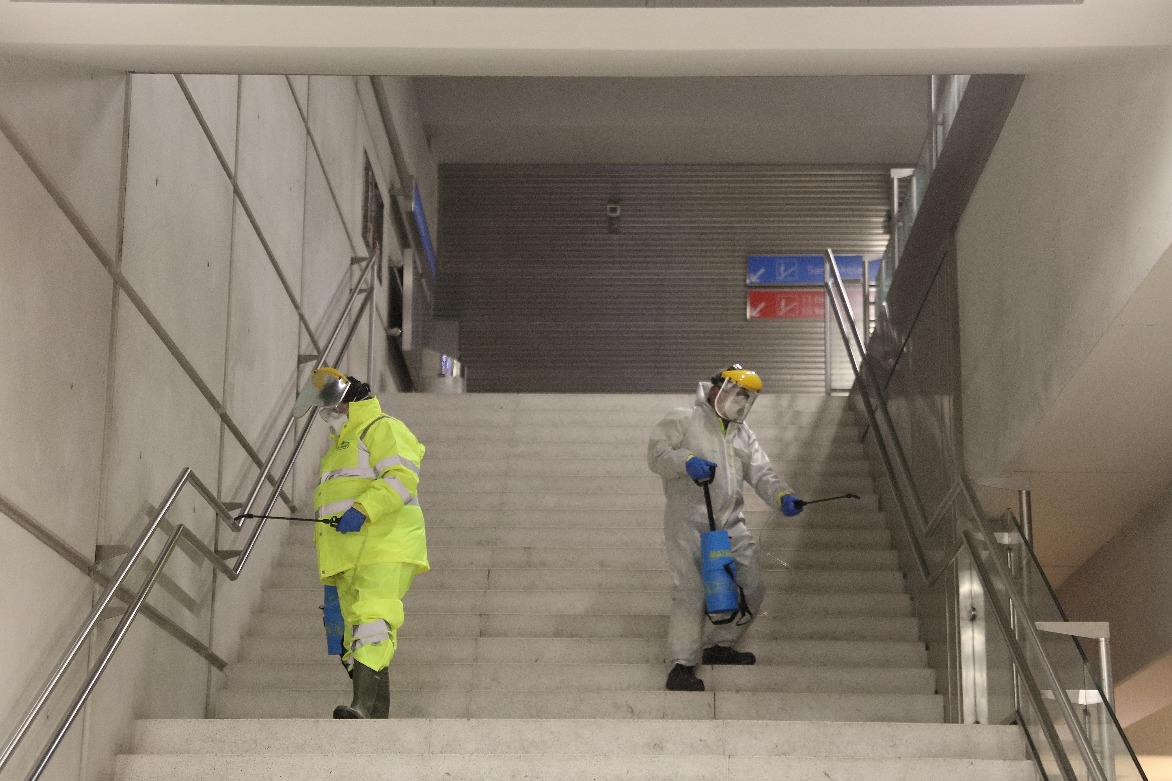 Euskadik desinfekzio-lanak indartu ditu bere trenbide-sareko geltokietan